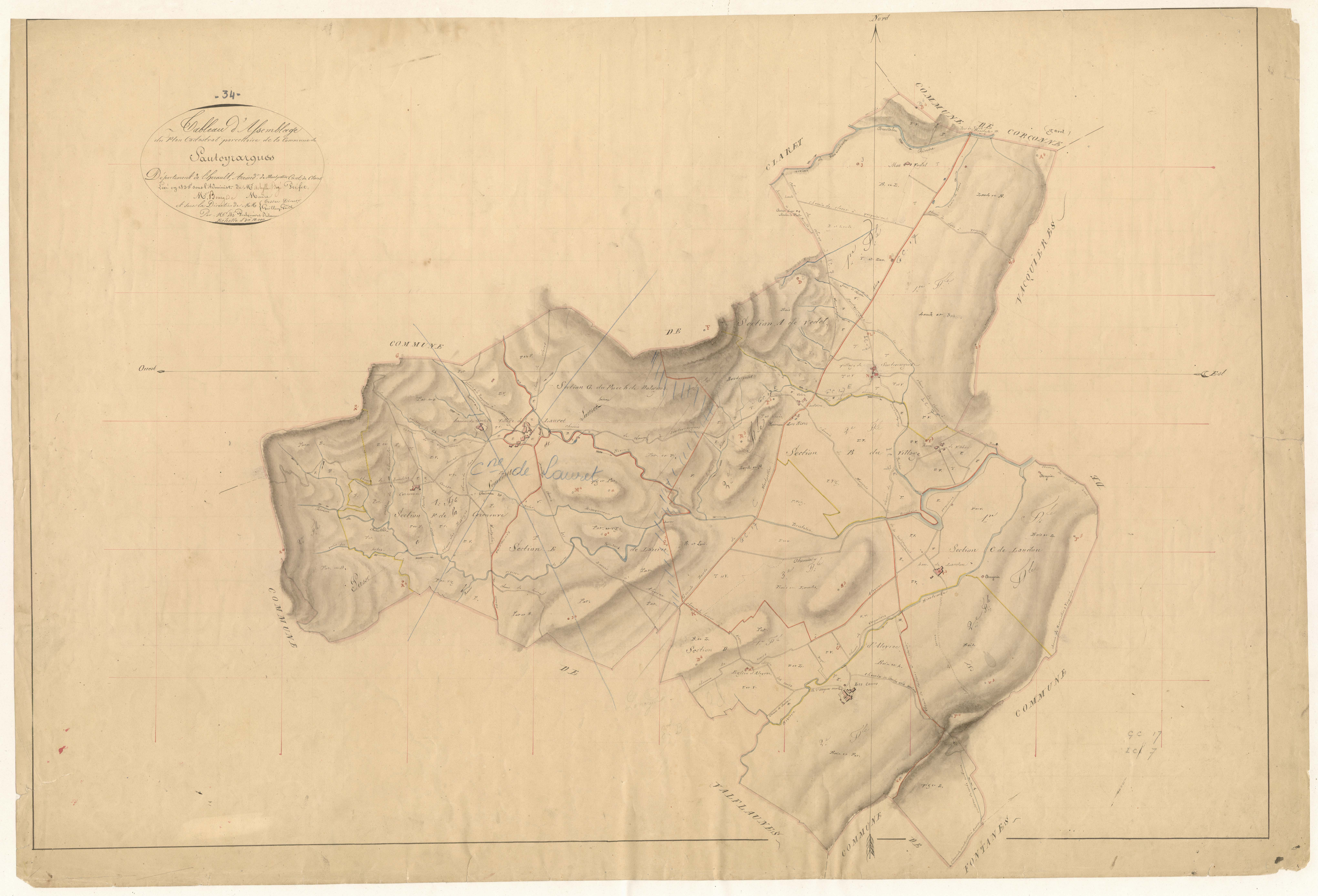 Sauteyrargues. - Cadastre napoléonien : tableau d'assemblage.